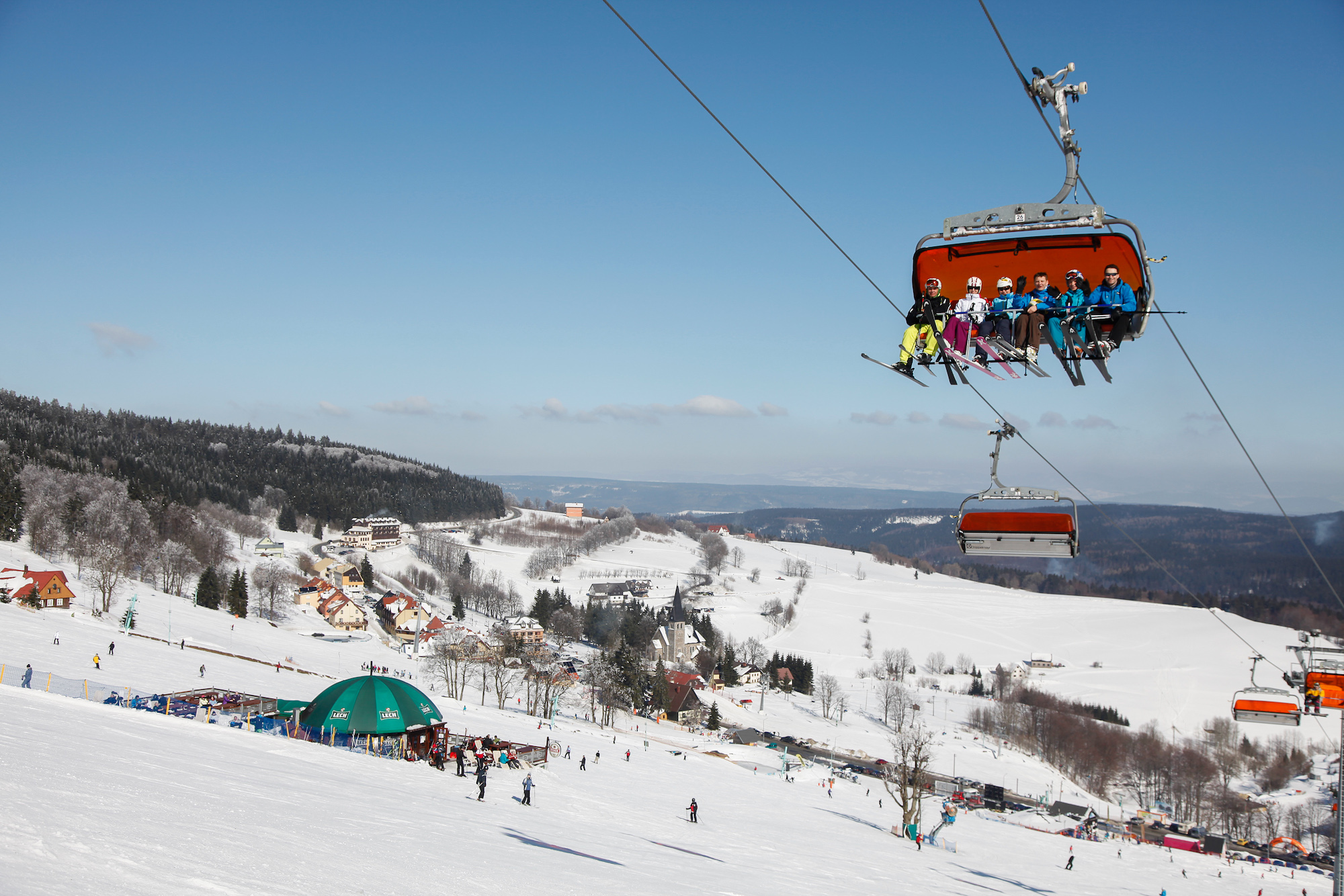 Zieleniec Ski Arena w pełni zimowego sezonu